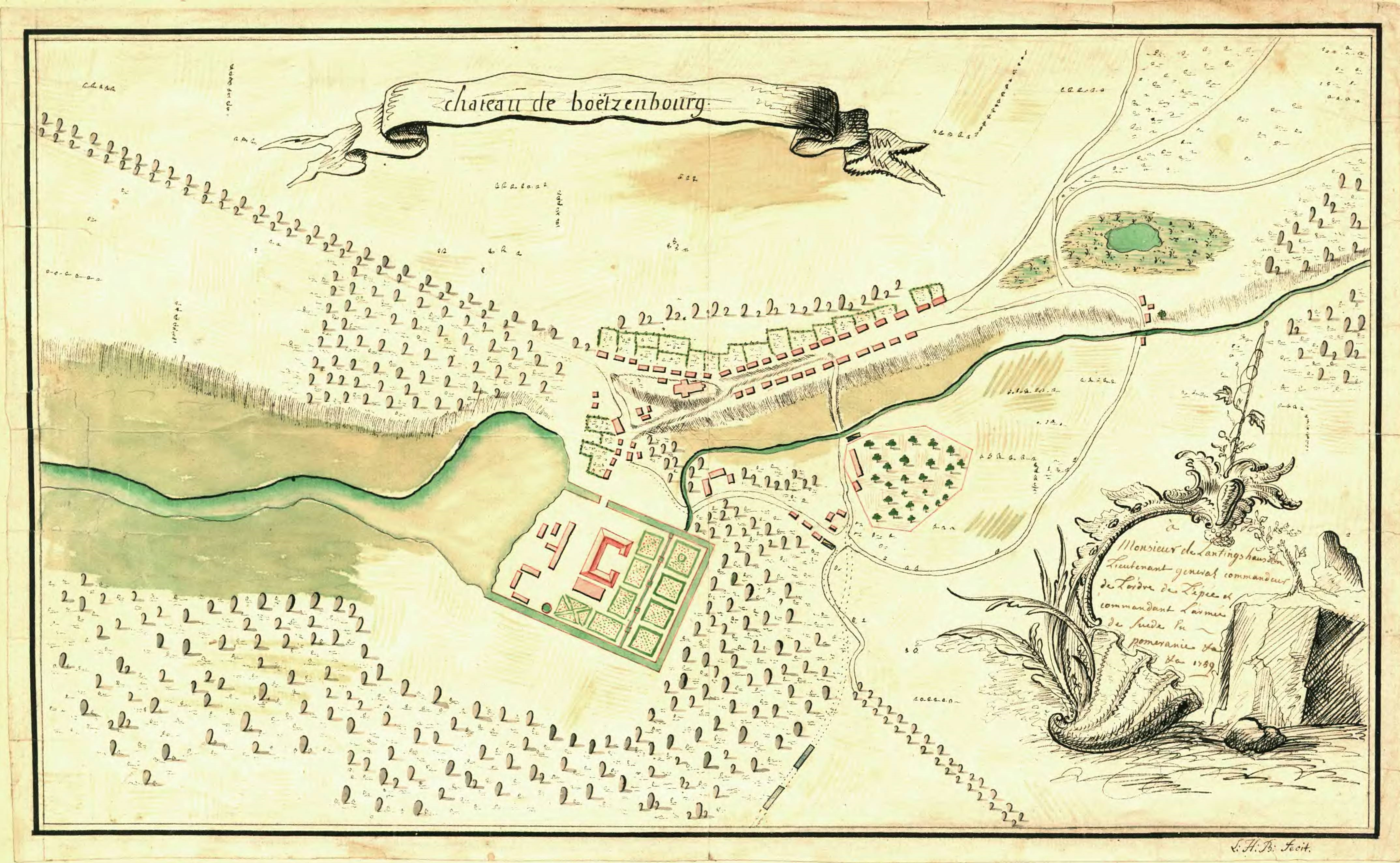 Lageplan Schloß Boitzenburg vom schwedischen Kriegsarchiv